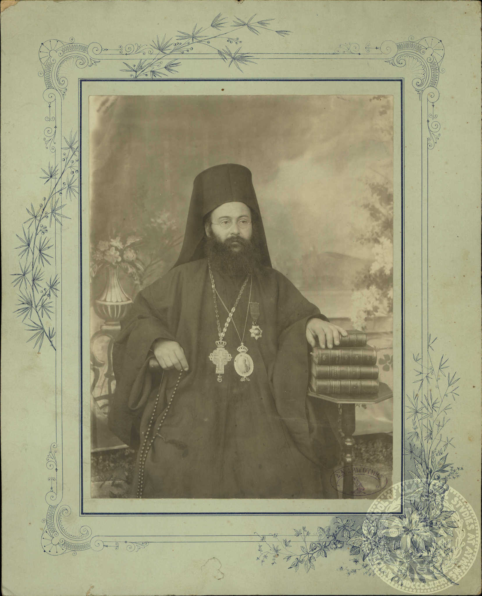 Тимотеос Ламнис